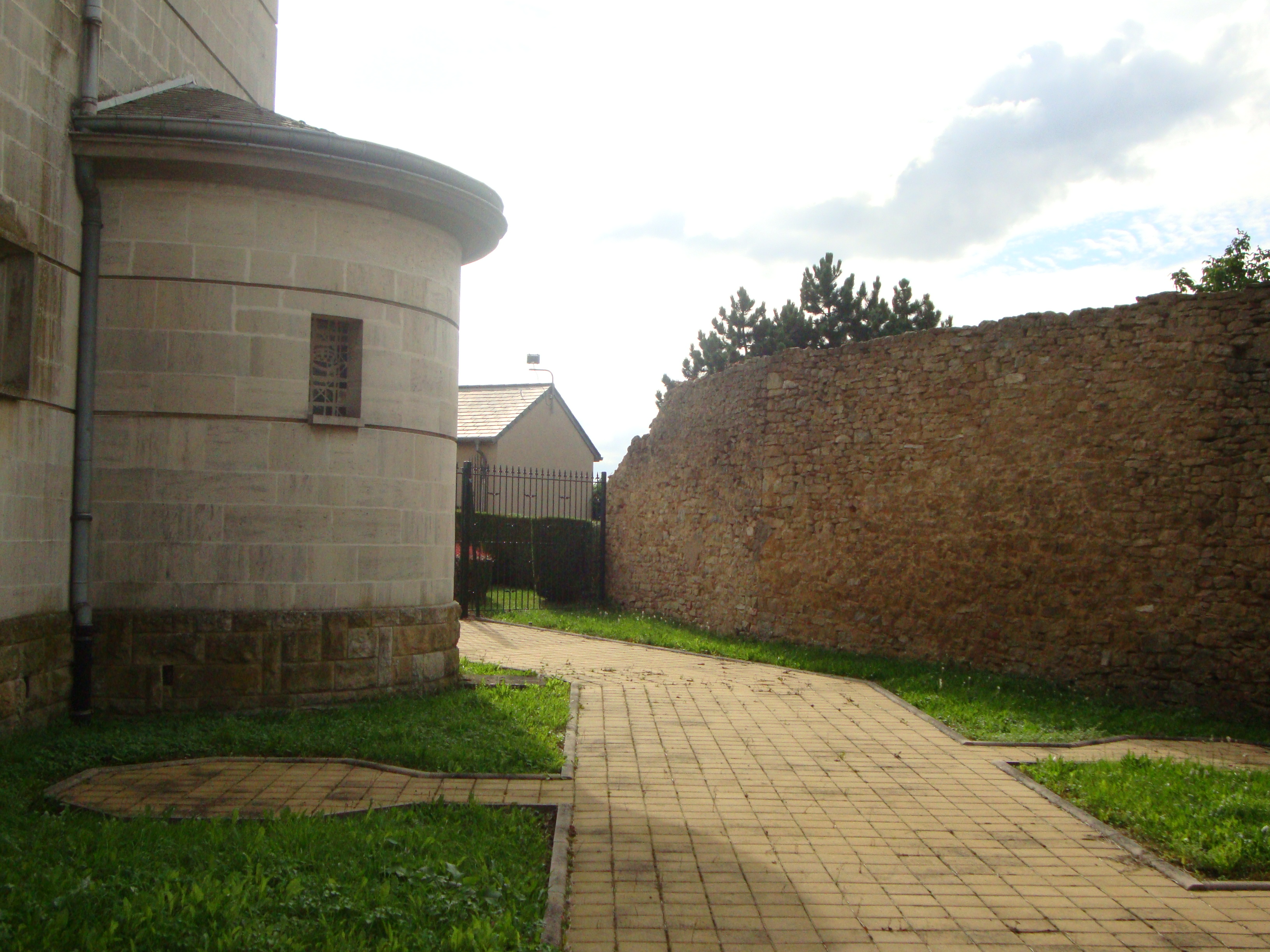 Roussy-le-Village (57)